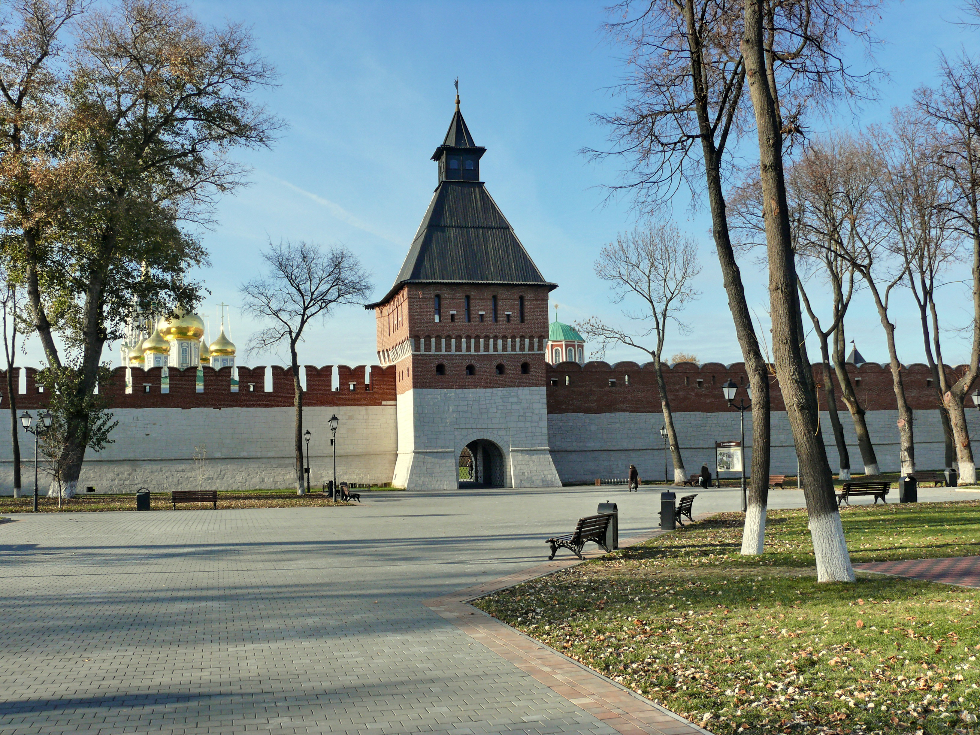 Башня Ивановских ворот (Тульская область, Тула, Кремль)